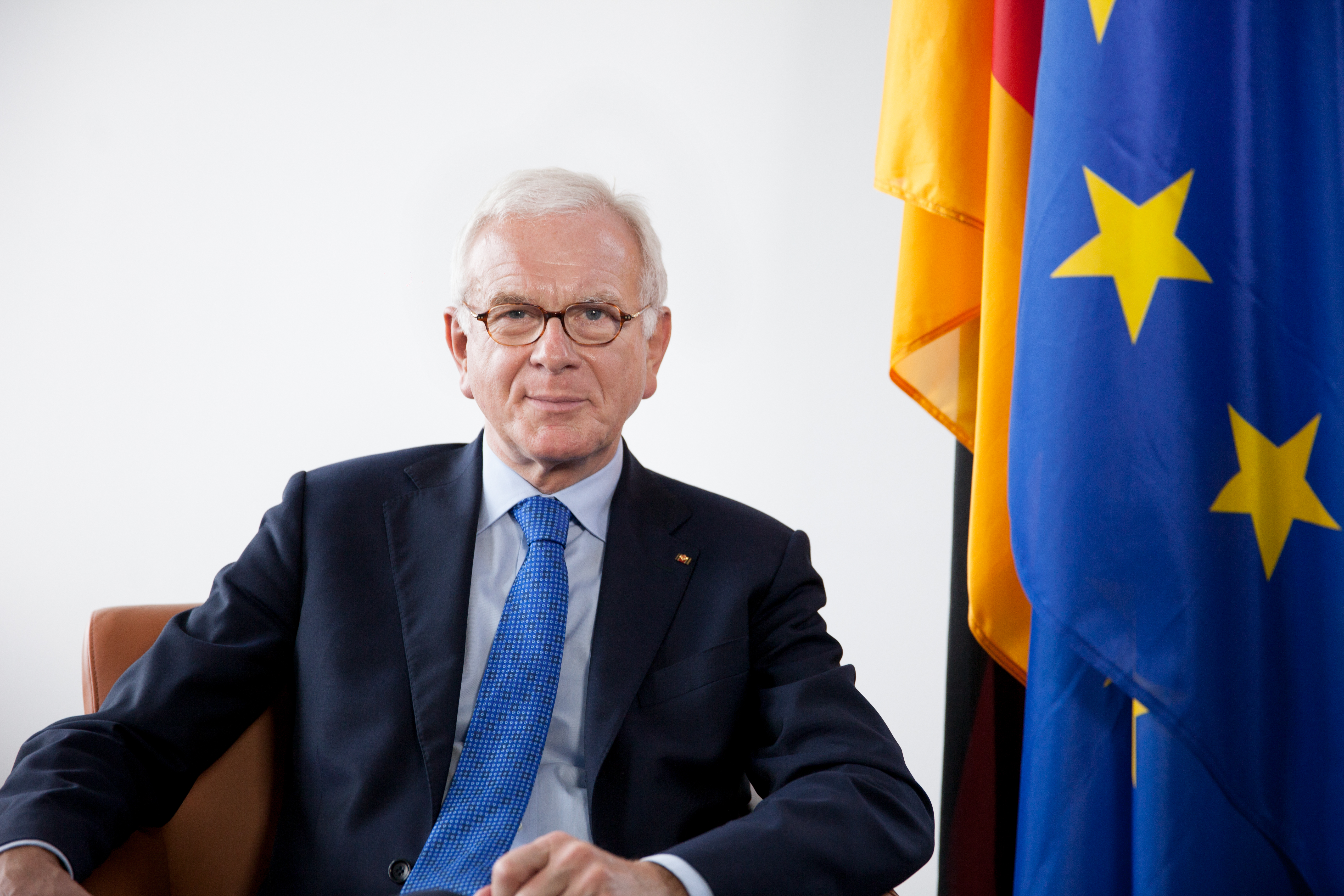 Dr. Hans-Gert Pöttering